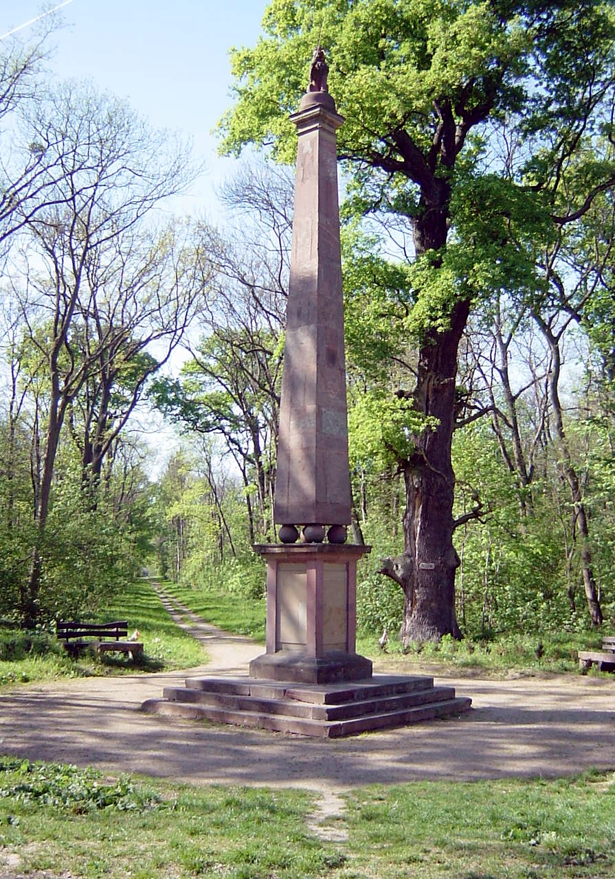 Die Schwedensäule (Südseite) ist ein Denkmal im Naturschutzgebiet Kühkopf-Knoblochsaue in Hessen. Sie erinnert an den Rheinübergang des Schwedenkönigs Gustav Adolf mit seinen Truppen im Dreißigjährigen Krieg am Hahnensand bei Erfelden am 21. Dezember 1631.